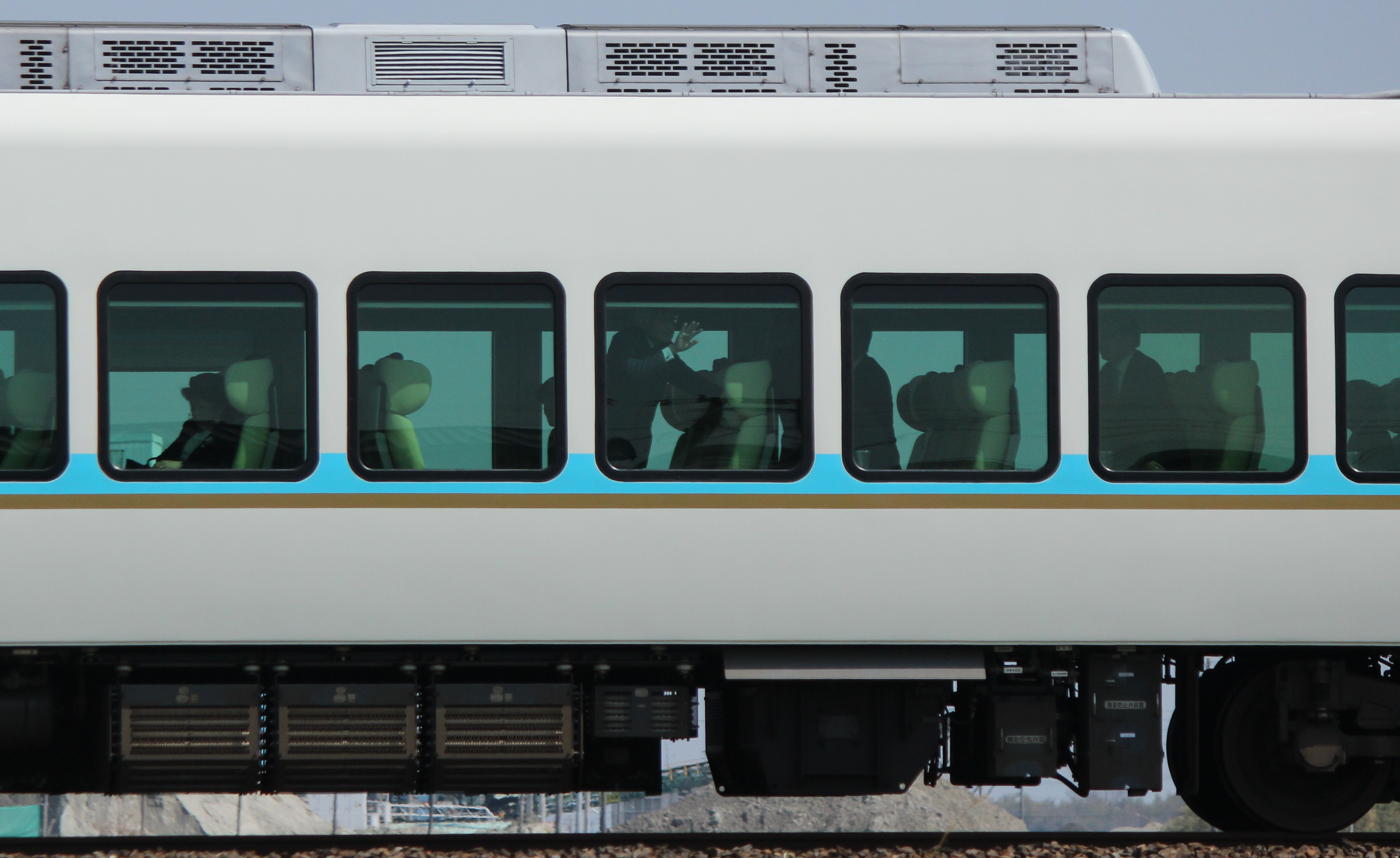 お召し列車 近鉄50000系（50101F、モ50200形）にご乗車の天皇陛下 2014年3月28日 漕代駅 - 櫛田駅間